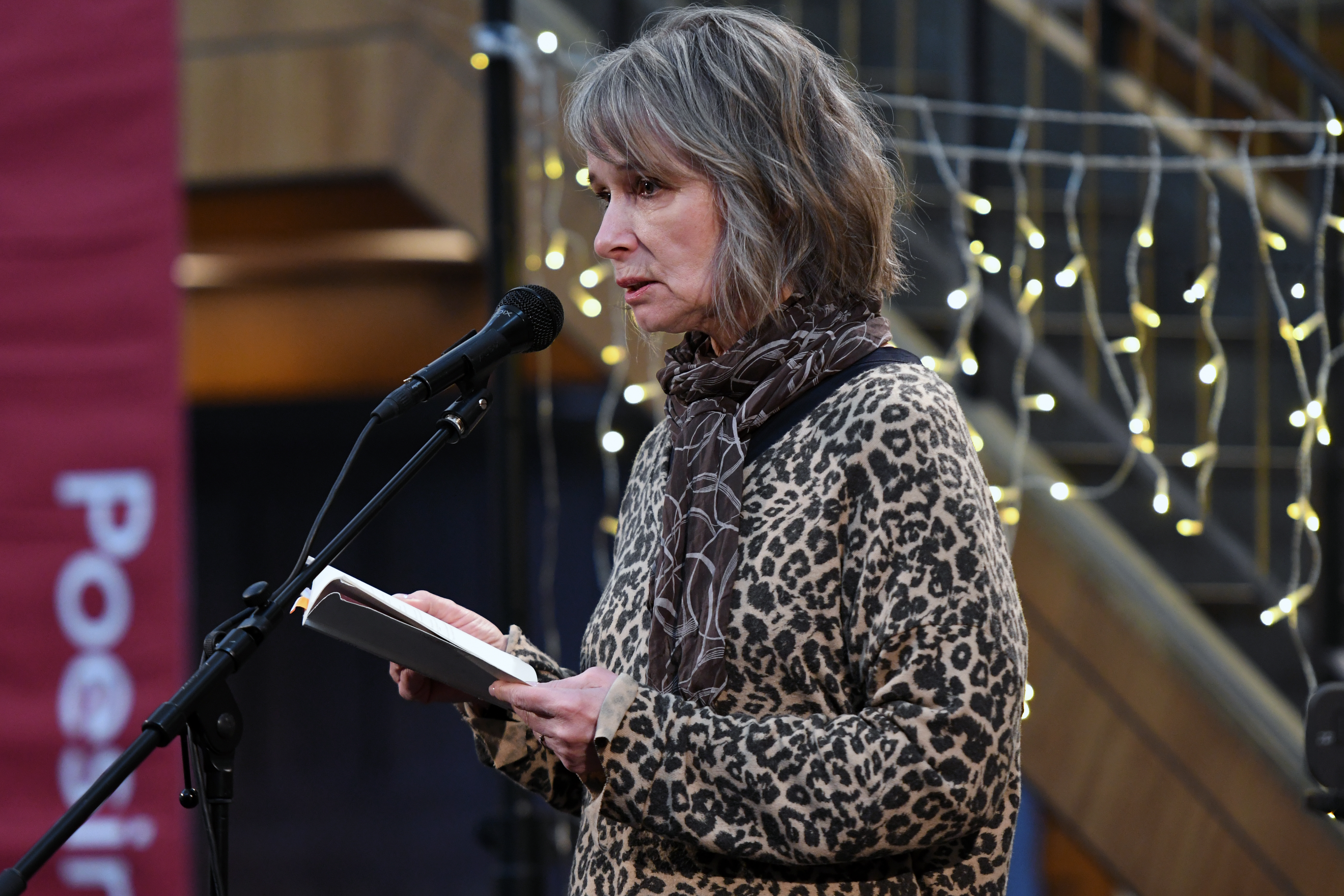 Poesimässan 2019, Stockholms stadsbibliotek. Linda Vilhjálmsdóttir.